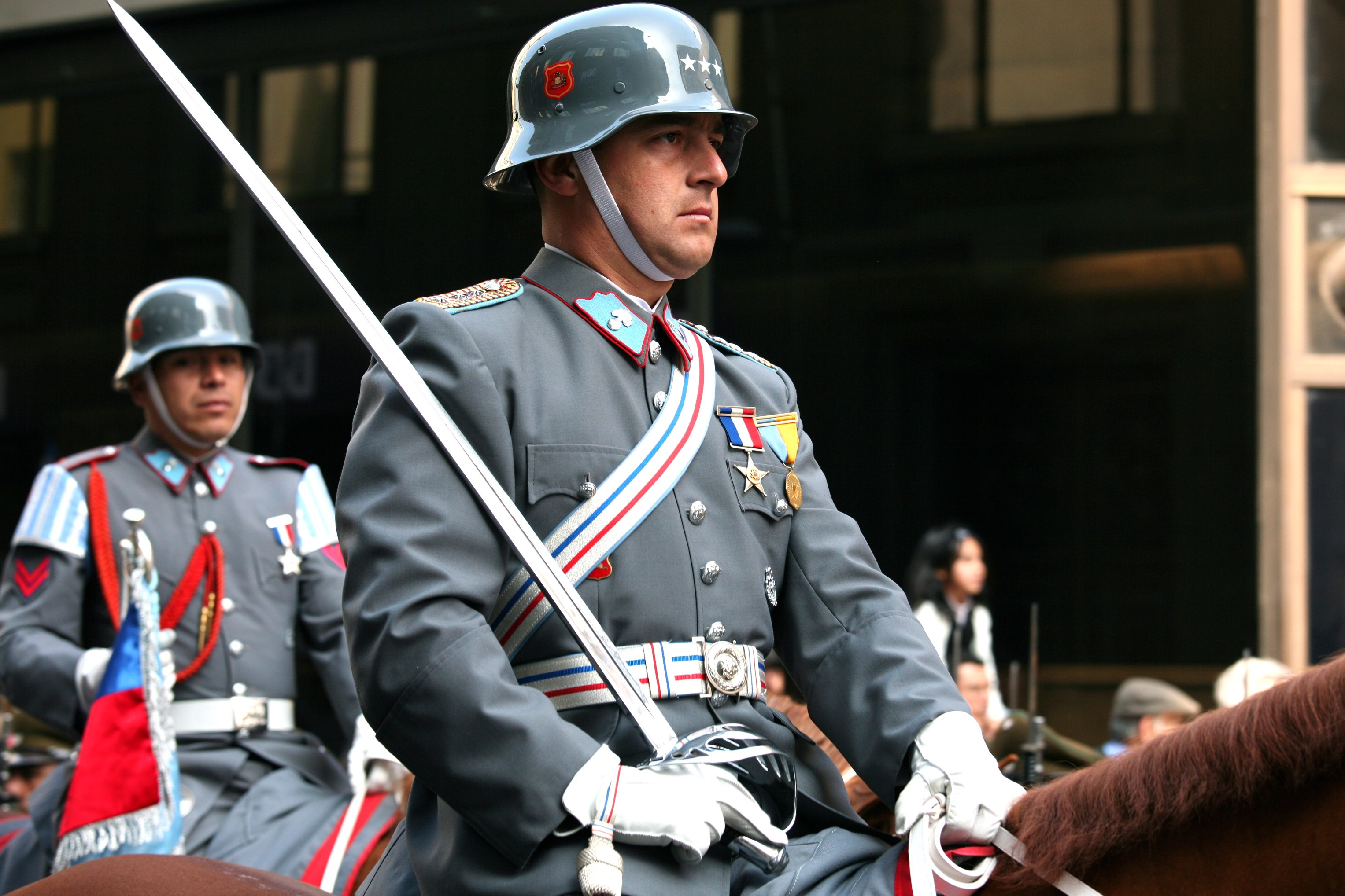 Oficial del Ejército de Chile a caballo.